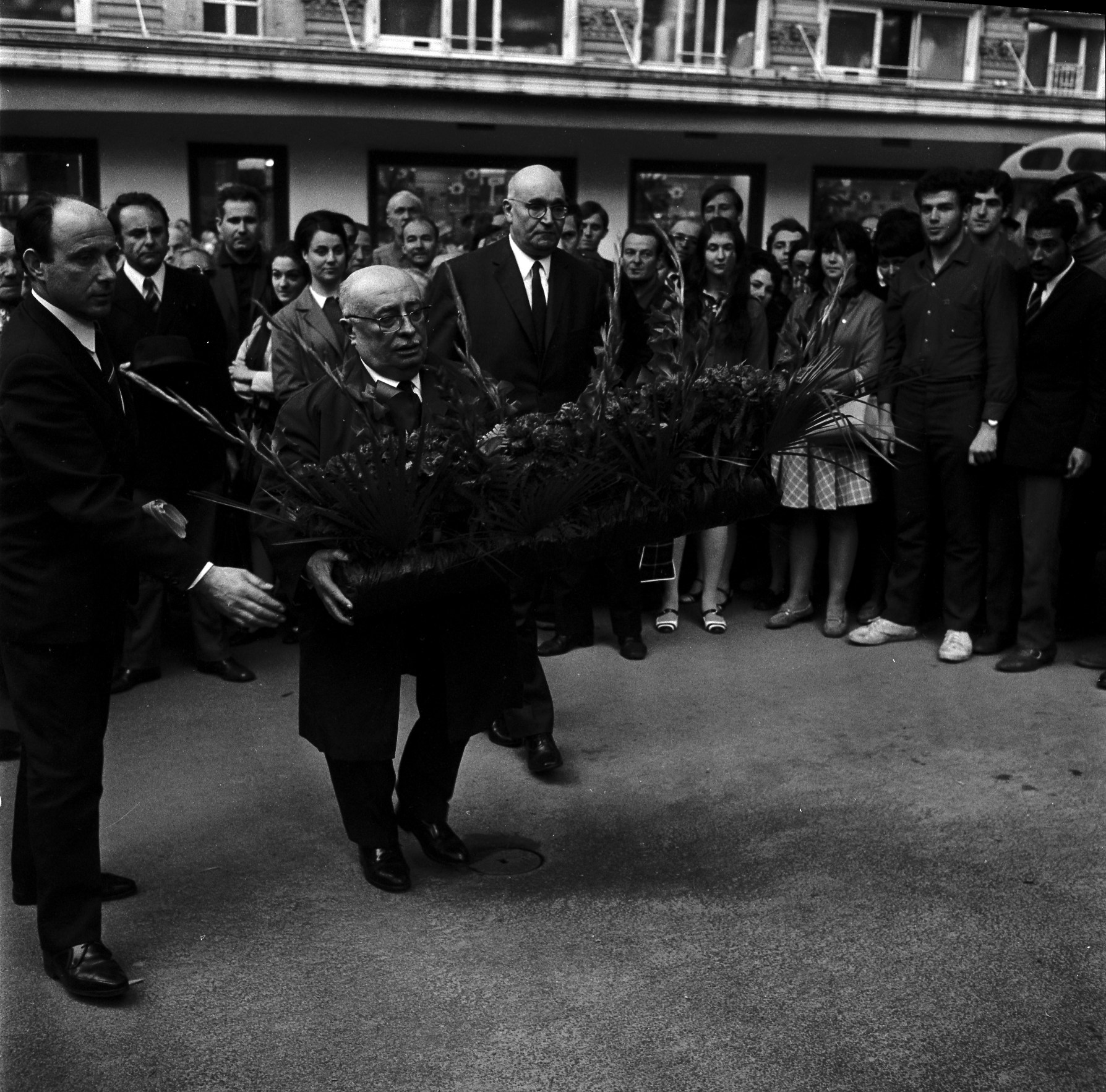 Square Charles-de-Gaulle. 23 mai 1969. Vue de messieurs Jacques Duclos, sénateur communiste, candidat à l'élection présidentielle et Jean Llante, premier secrétaire de la fédération communiste de la Haute Garonne, lors d'un dépôt de gerbe devant la statue de Jean Jaurès, à l'occasion de la campagne des élections présidentielles.